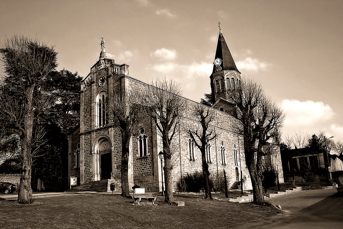 Eglise de Saint-Bonnet les Oules